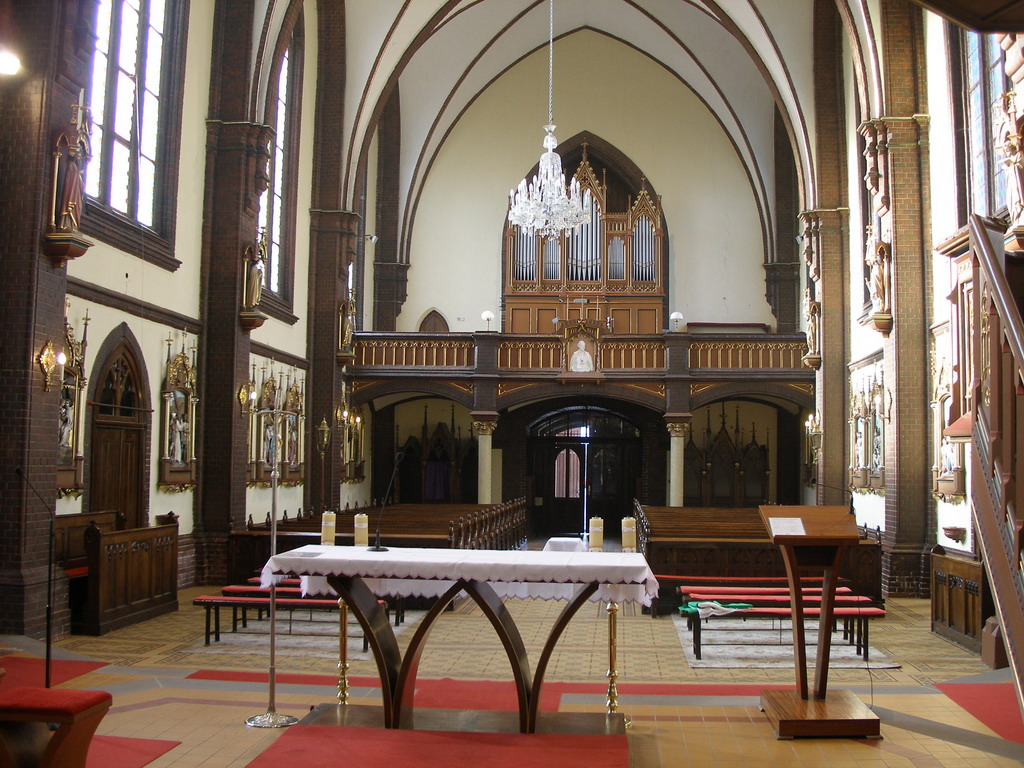 Římsko-katolický kostel v Bohumíně_Interiér